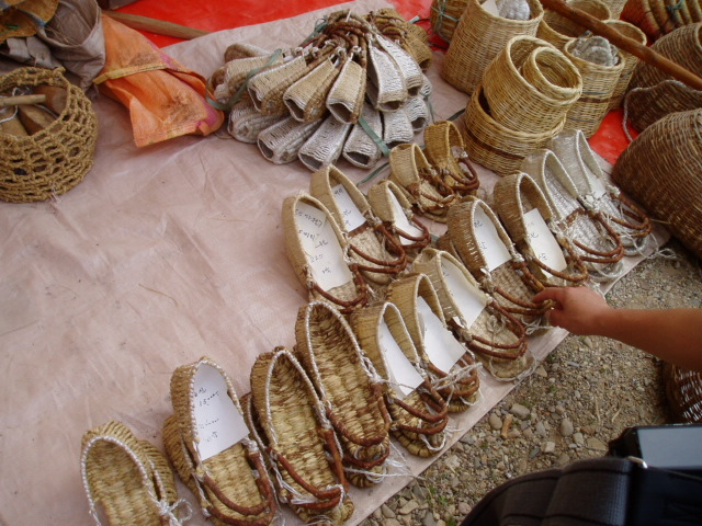 Korea-Jipsin